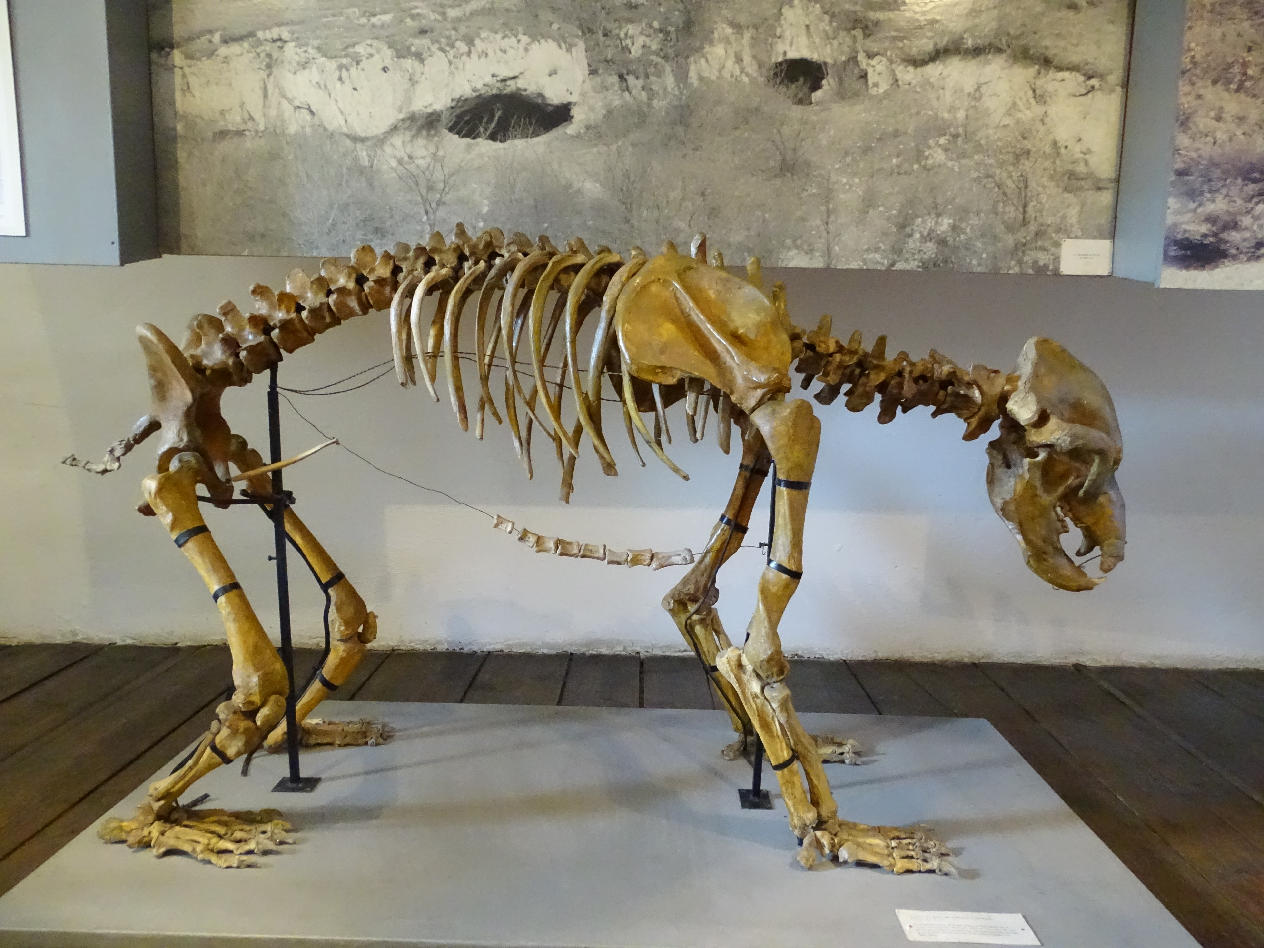 Das in der Bärenhöhle bei Winden am See gefundene Skelett eines Höhlenbären. Es befindet sich heute im Turmmuseum im ehemaligen Wehrturm von Breitenbrunn.